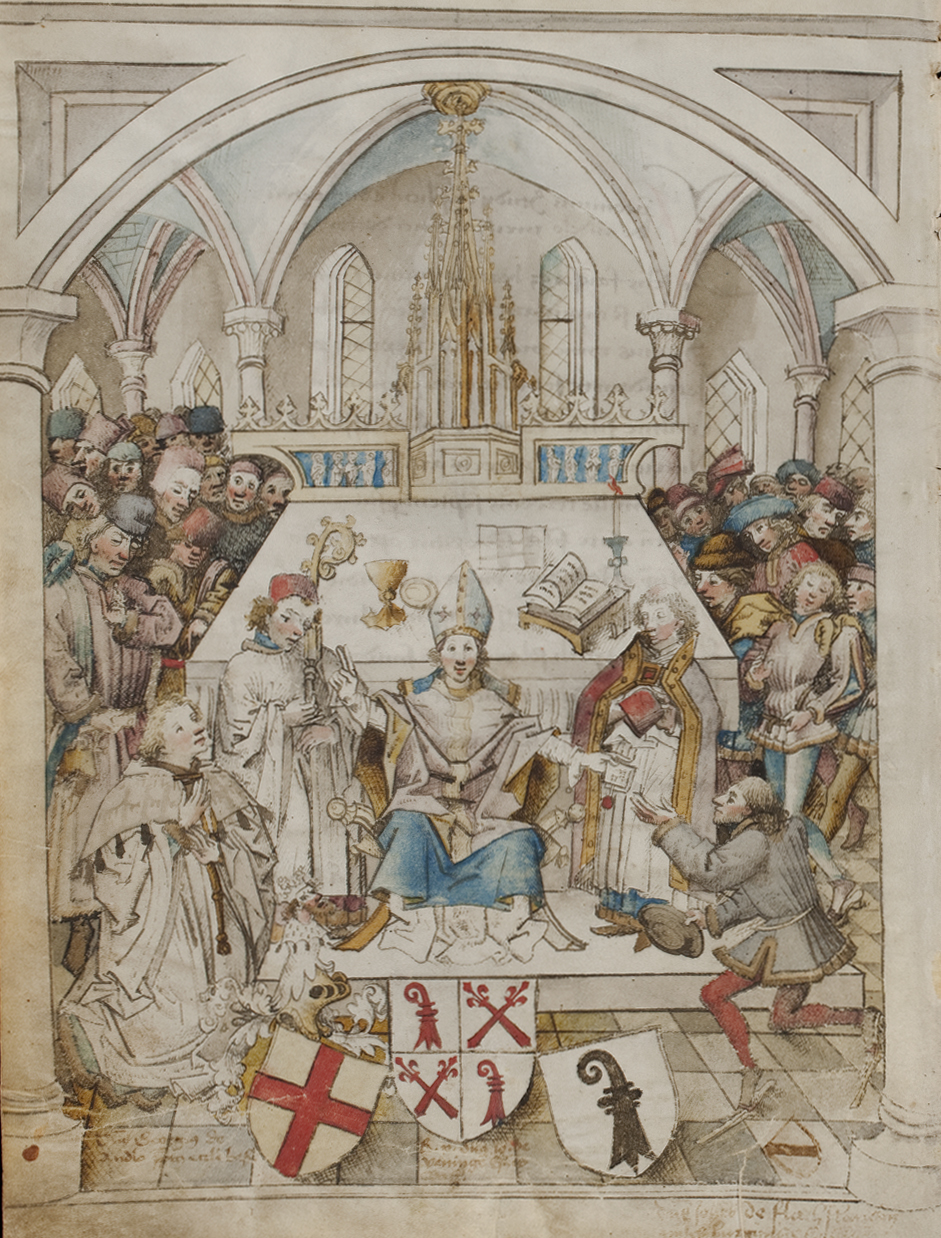 Gründungszeremonie der Universität Basel am 4. April 1460 im Basler Münster. Bischof Johann V. von Venningen (mittig mit seinem Wappen) gründet die Universität Basel. Universitätsbibliothek Basel AN II 3, Rektoratsmatrikel der Universität Basel, Band 1 (1460-1567), Titelminiatur der Rektoratsmatrikel [1] Martin Steinmann, Universitätsbibliothek Basel, bearbeitet und ergänzt von Ueli Dill und Florian Mittenhuber, Universitätsbibliothek Basel, 2010.